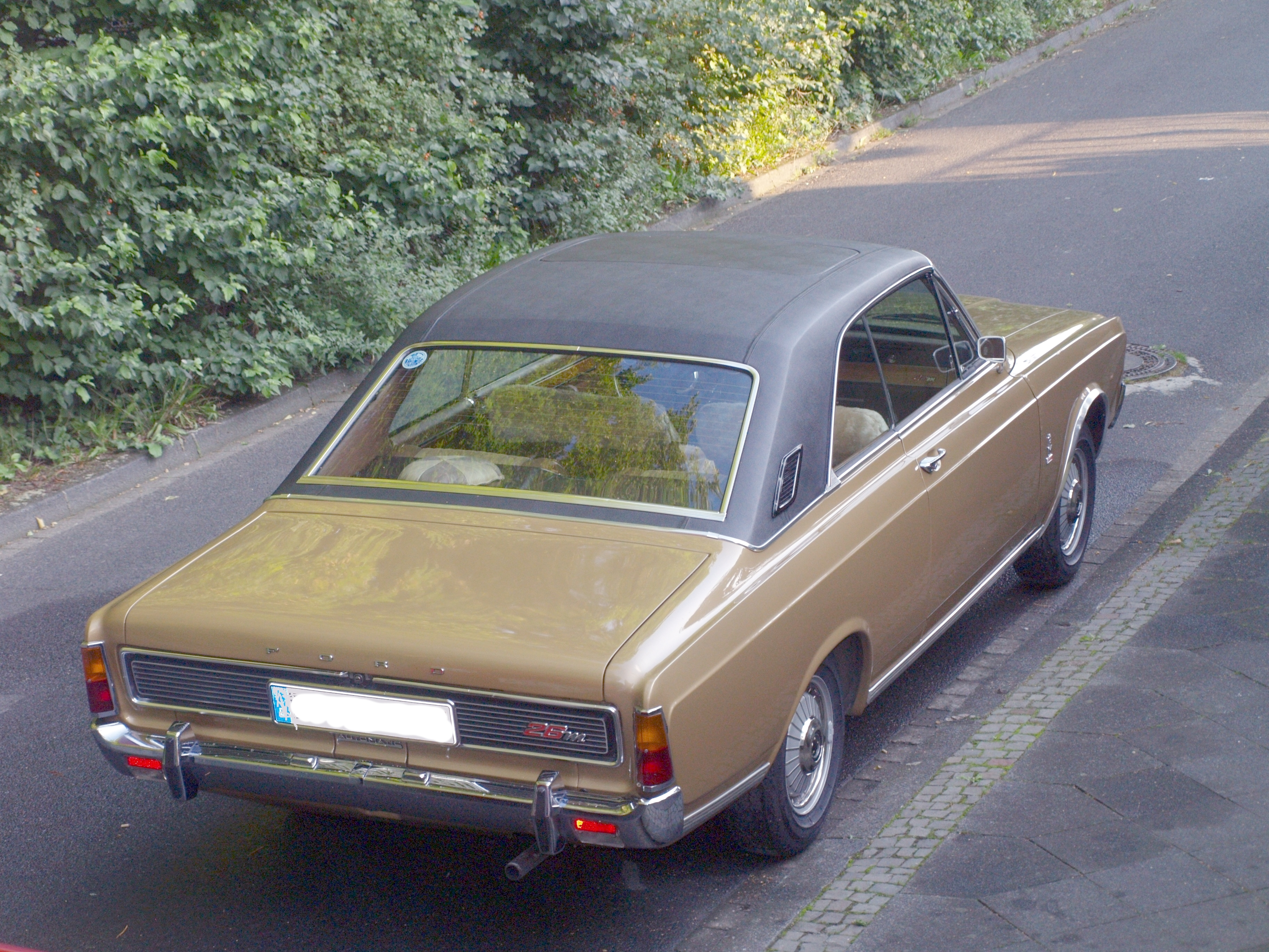 Ford 26M Coupe